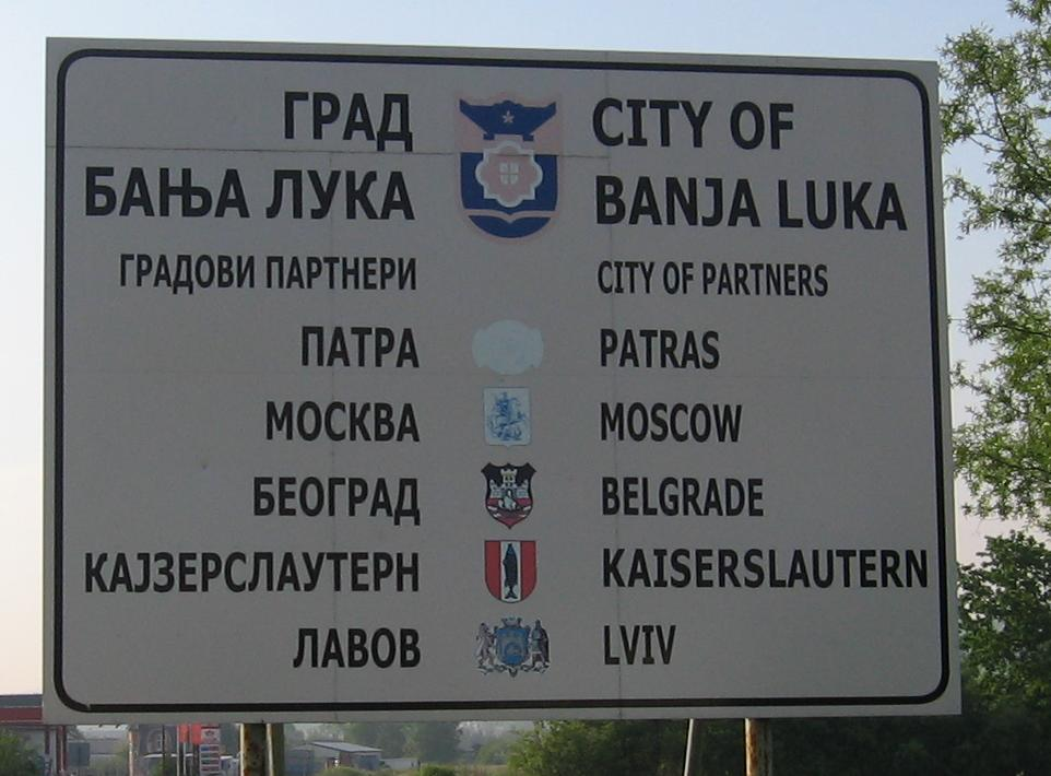 Слика табле градова-партнера Бањалуке, на улазу у Бањалуку из правца Приједора.